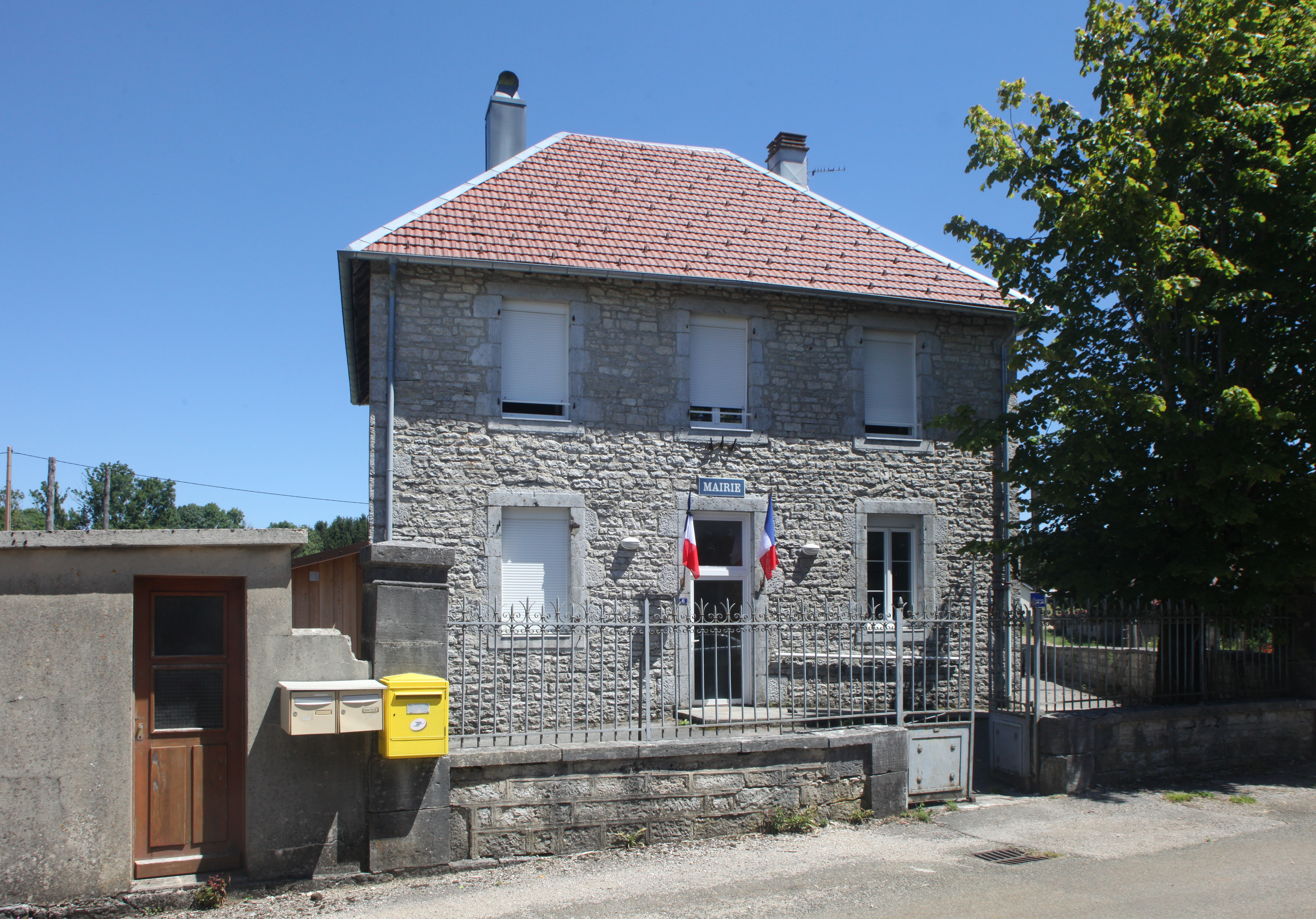 Mairie de Fraroz (Jura).